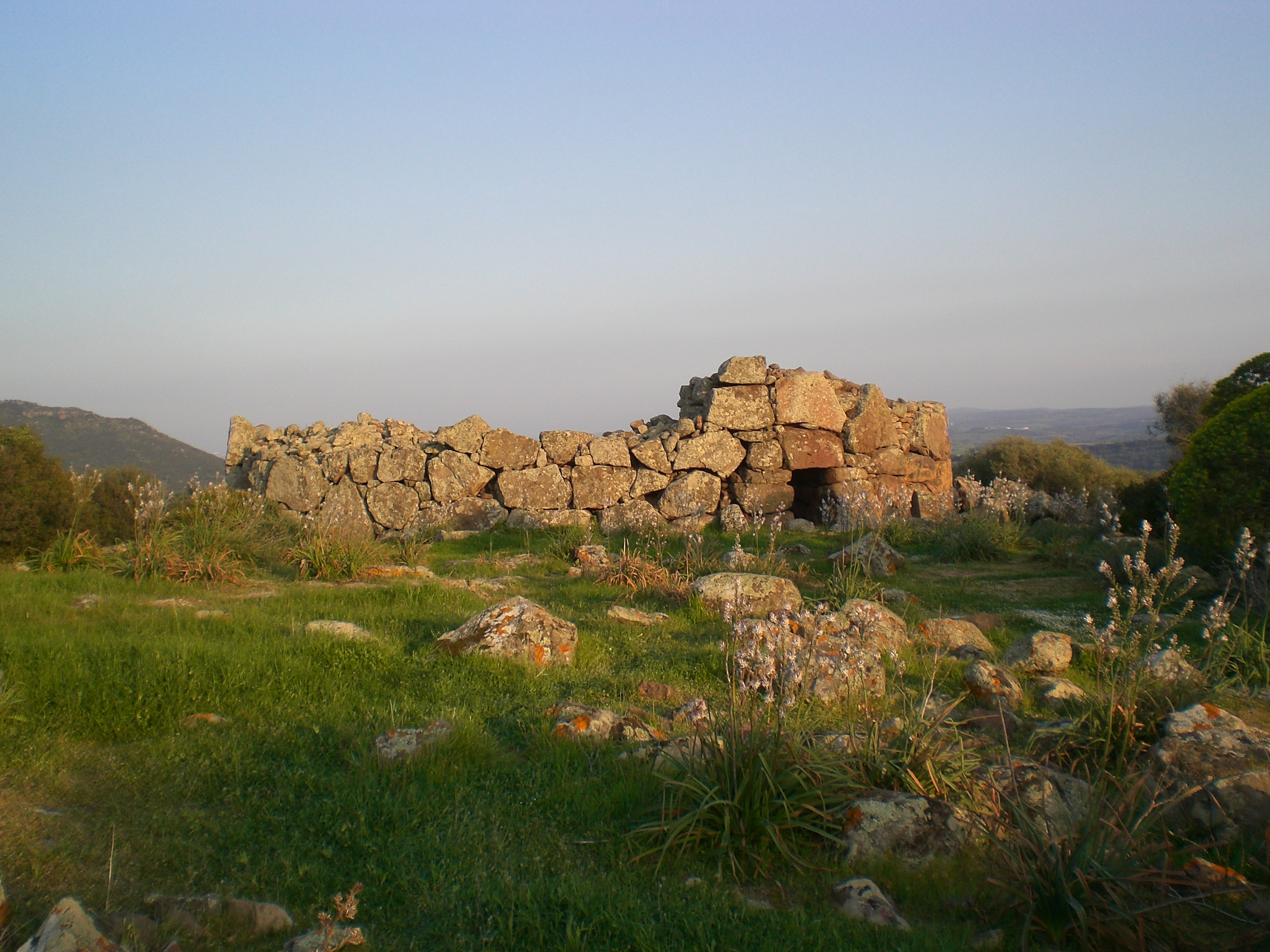 Complesso prenuragico di Monte Baranta, Olmedo, Sardegna, Italy